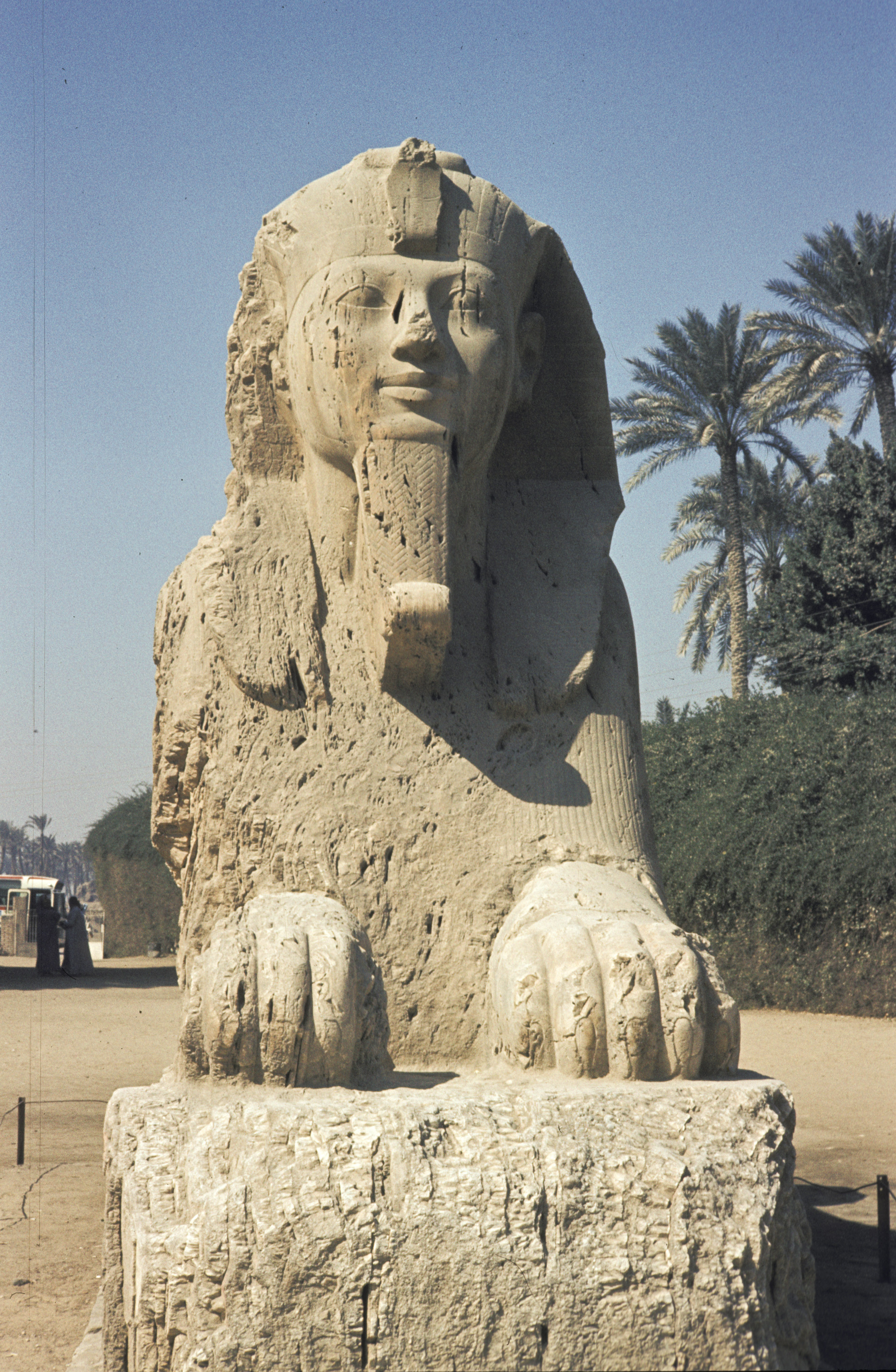 Egypt